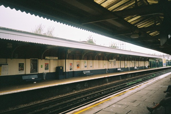 Harlesden station